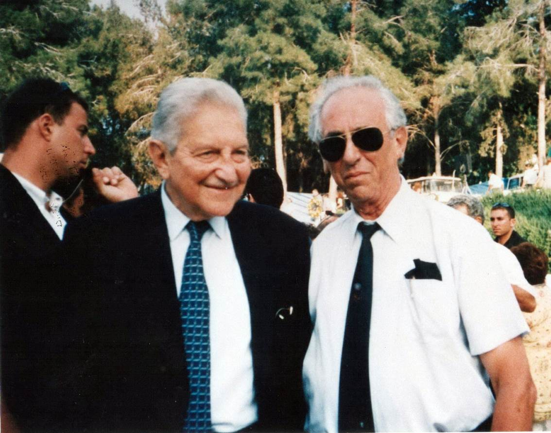 נשיא המדינה עזר ויצמן